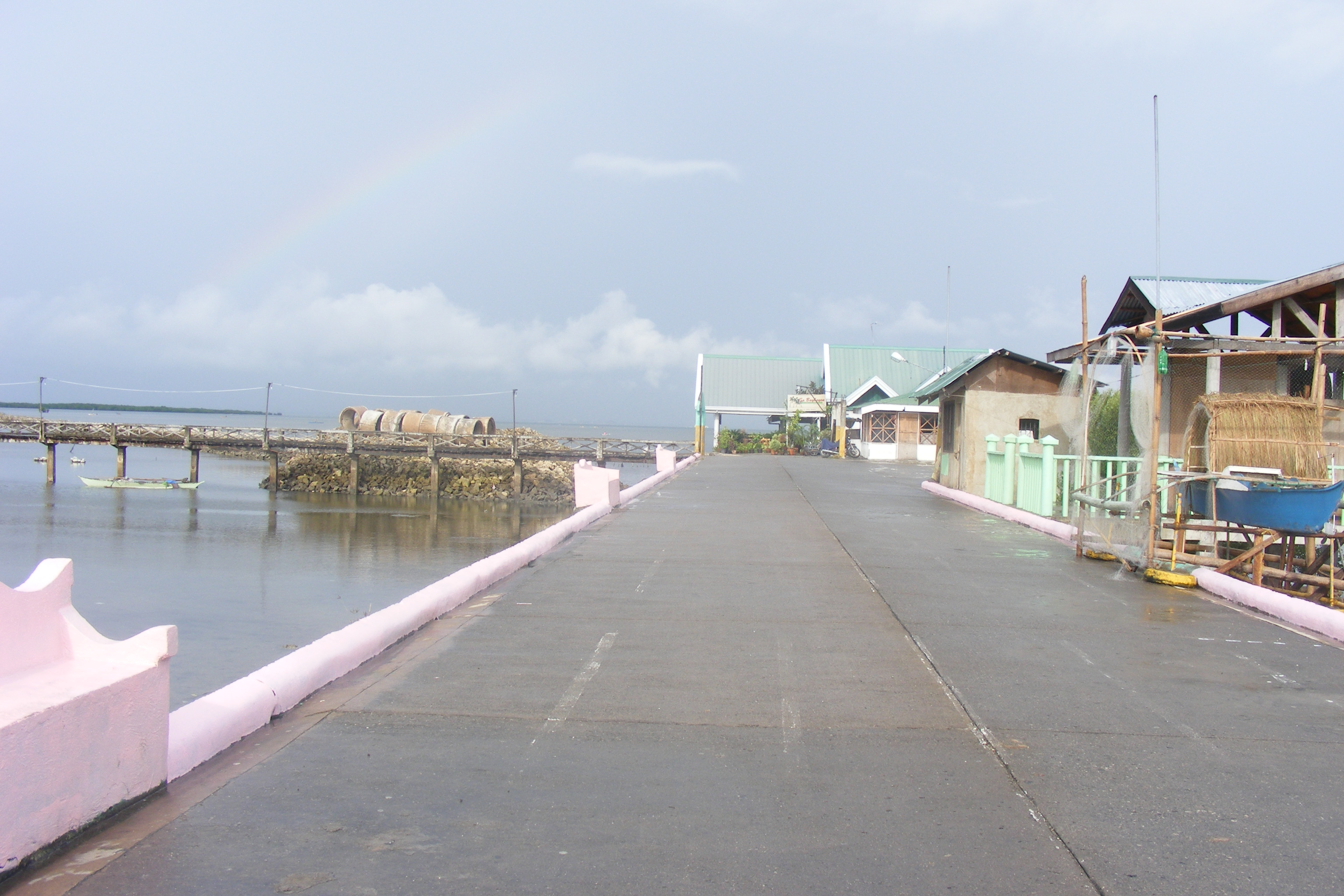 DAY-as Broadwalk